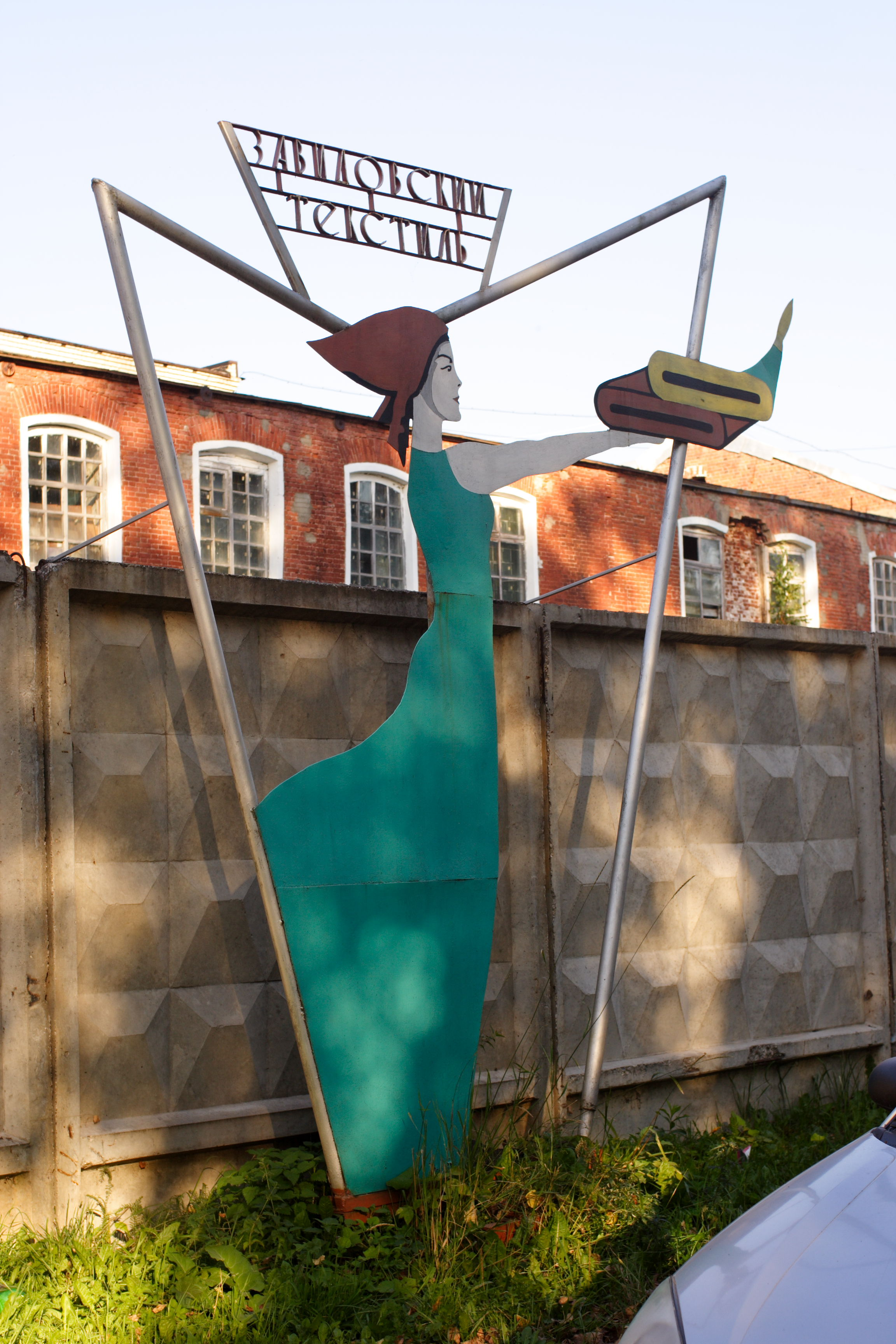 Завидовский текстиль: символ